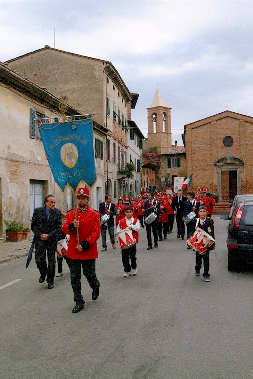 Filarmonica "G. Puccini" - Palaia derivata da File:Bandasantamaria.gif